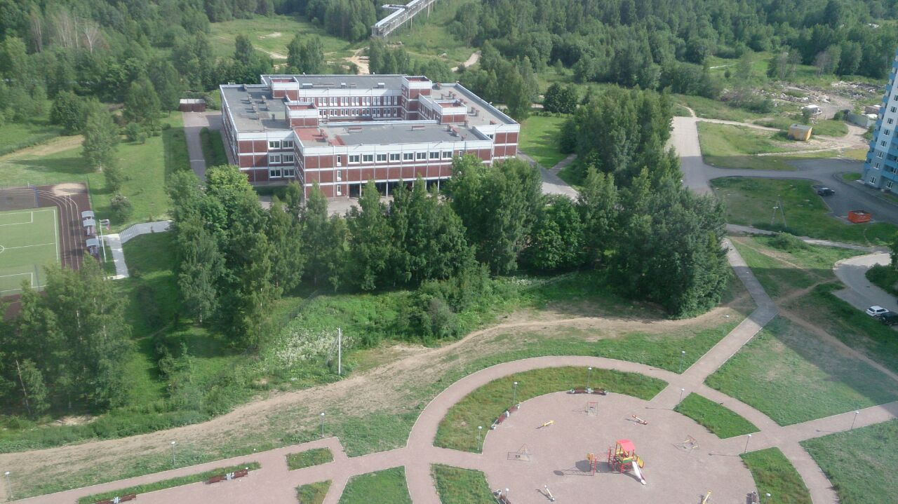 Новодевяткинская средняя общеобразовательная школа № 1